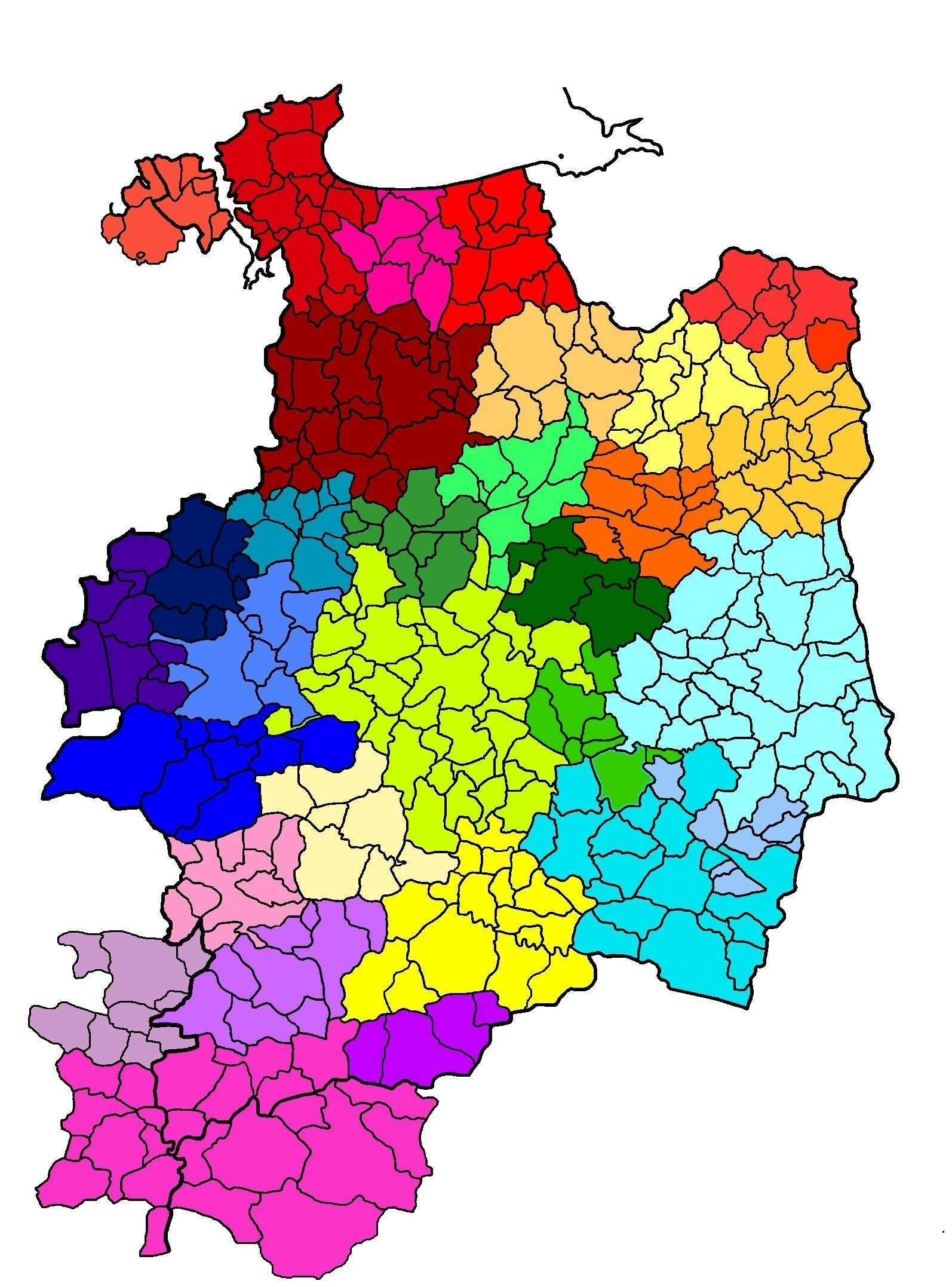 Intercommunalités-d'ille-et-vilaine au 01-01-2013